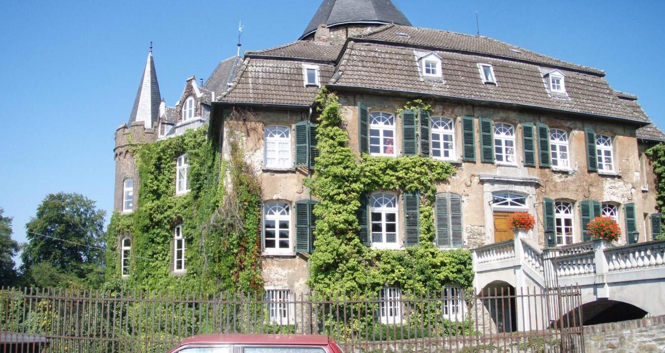 Schloß Linnep von Westen, Herrenhaus mit Treppe über den Burggraben zum Haupteingang, das Türmchen am linken Bildrand ist Teil des Anbaus nach 1855